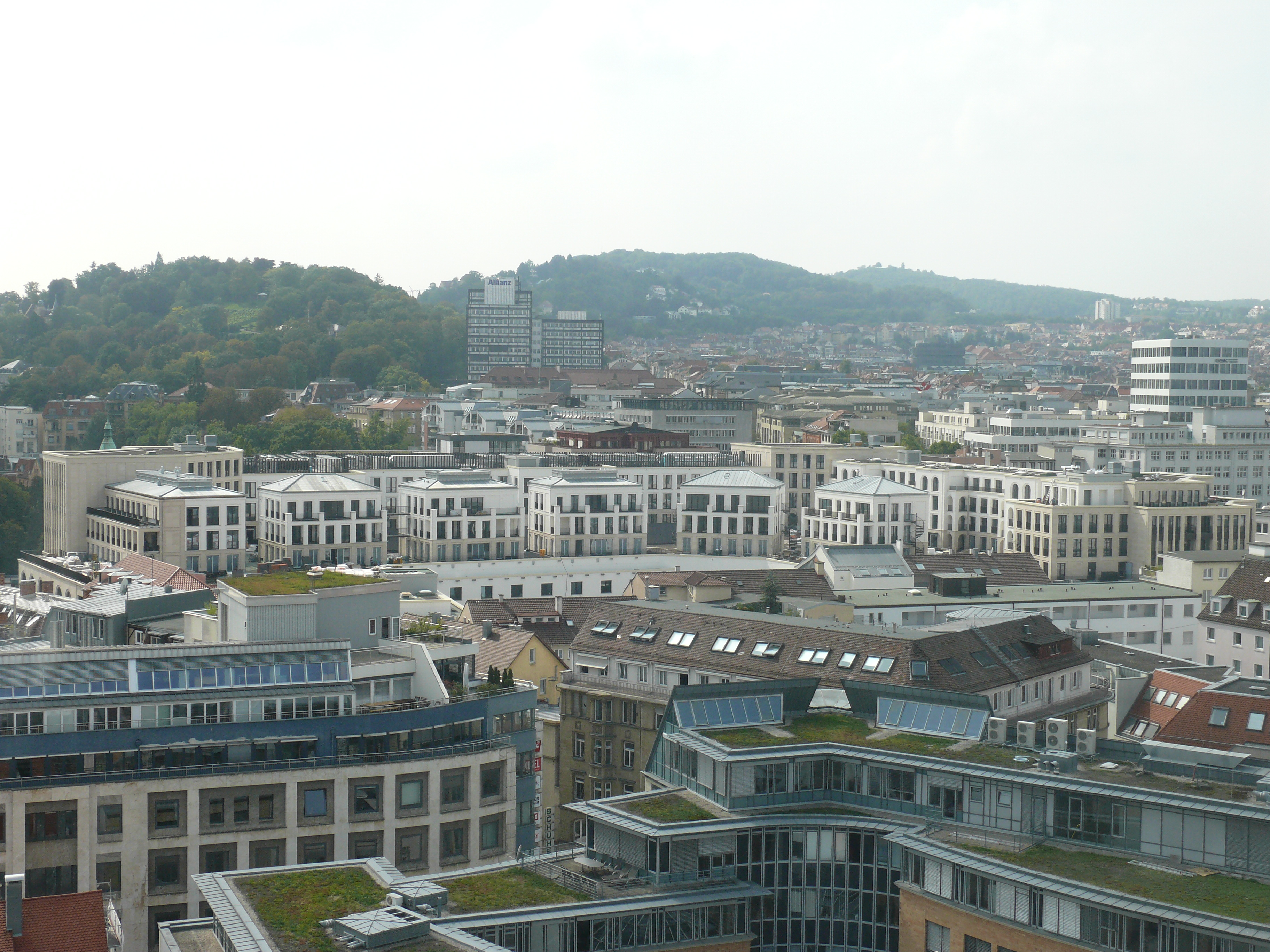 Blick auf die Ostseite des Einkaufszentrums "Das Gerber" in Stuttgart.